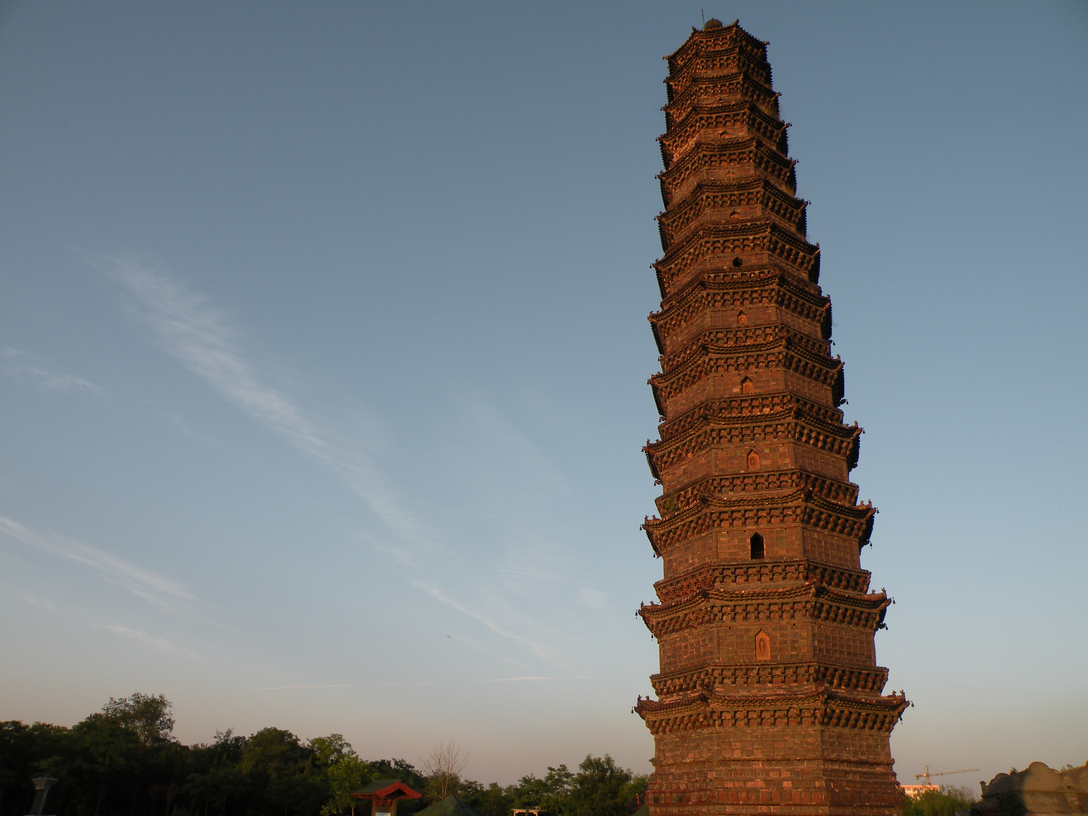 Żelazna pagoda w mieście Kaifeng w chinach. Zdjęcie to dobrze ilustruje pochodzenie nazwy tej pagody, która w rzeczywistości wybudowana jest z kamienia.